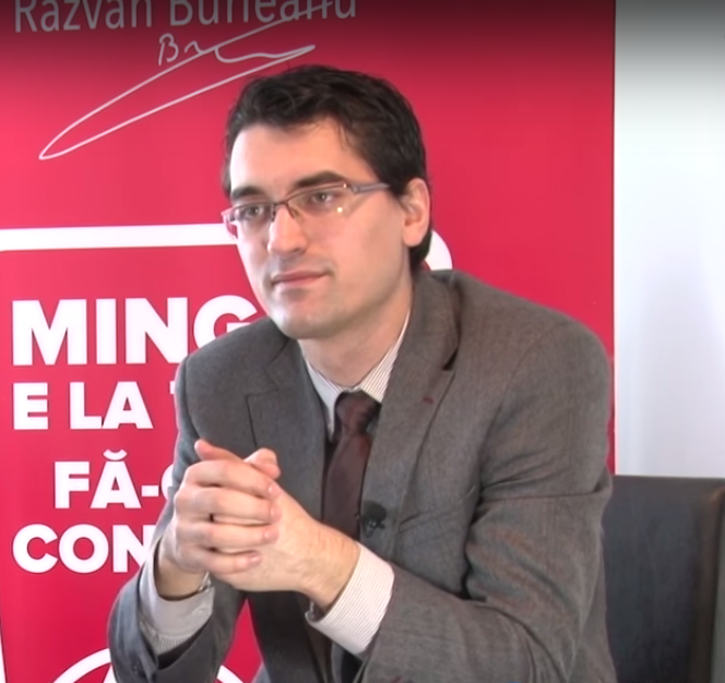 Răzvan Burleanu, președintele FRF.